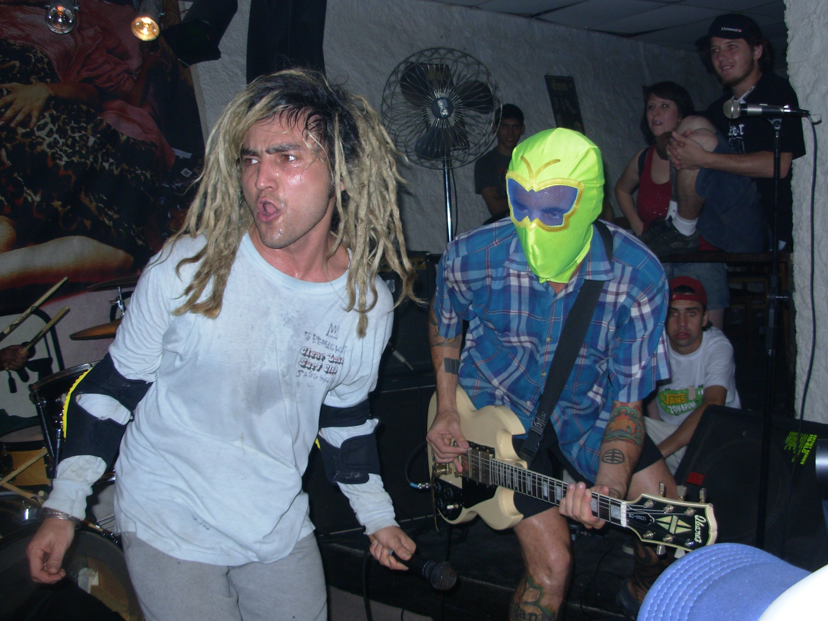 Boom Boom Kid en Brasil, 2007.